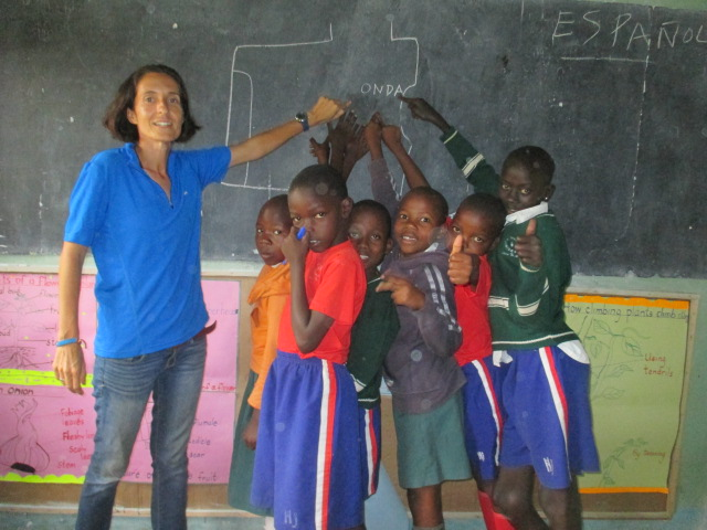 Donant classes a Uganda